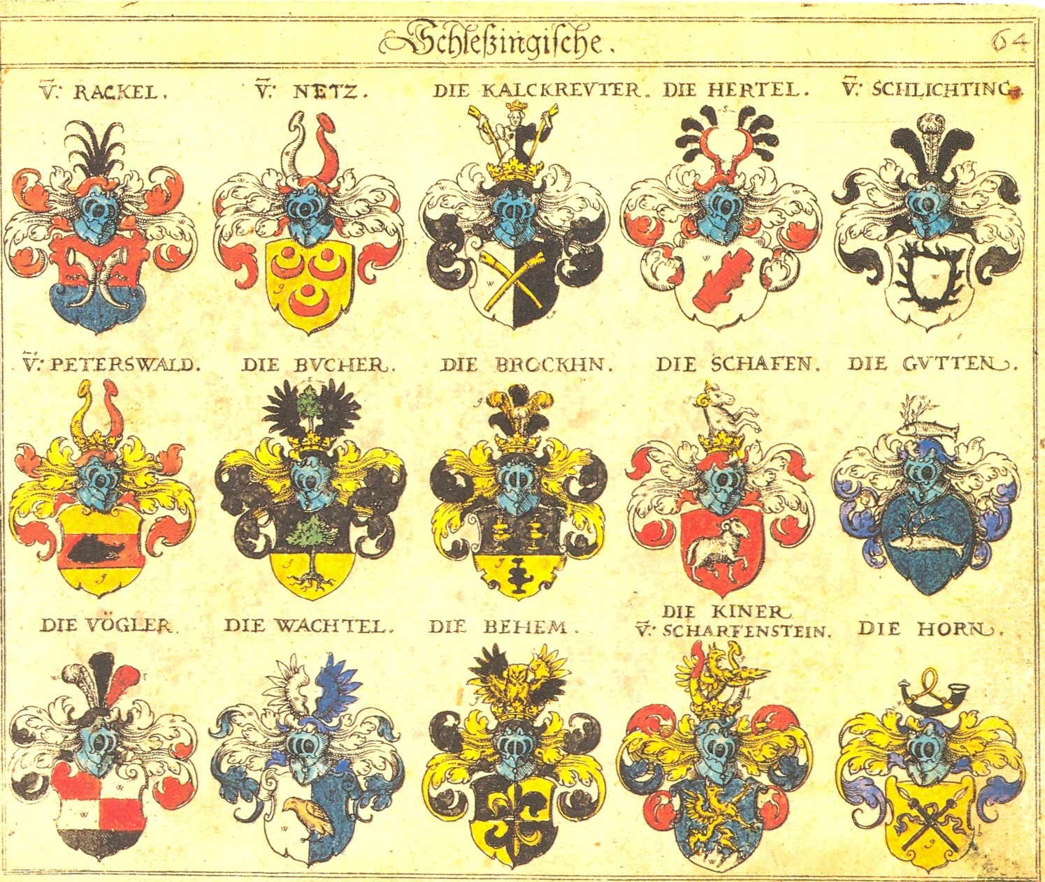 Johann Siebmacher: New Wappenbuch eingescannt aus: Horst Appuhn (Hrsg.), Johann Siebmachers Wappenbuch. Die bibliophilen Taschenbücher 538, 2. verb. Aufl , Dortmund 1989 Schlesische Blatt 64